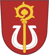 Skuhrov (okres Havlíčkův Brod)